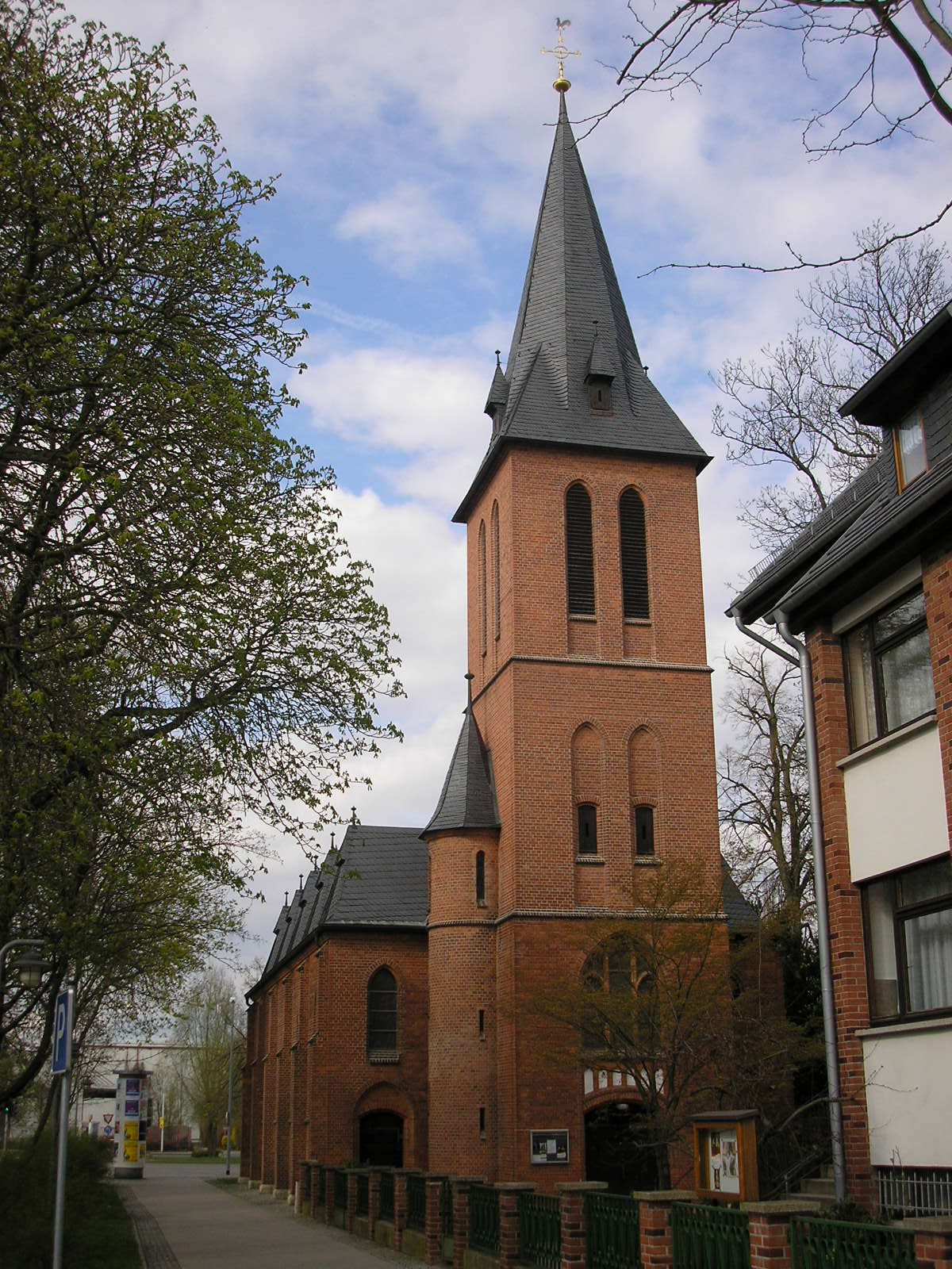 Die katholische Franziskuskirche in Sömmerda (Thüringen).